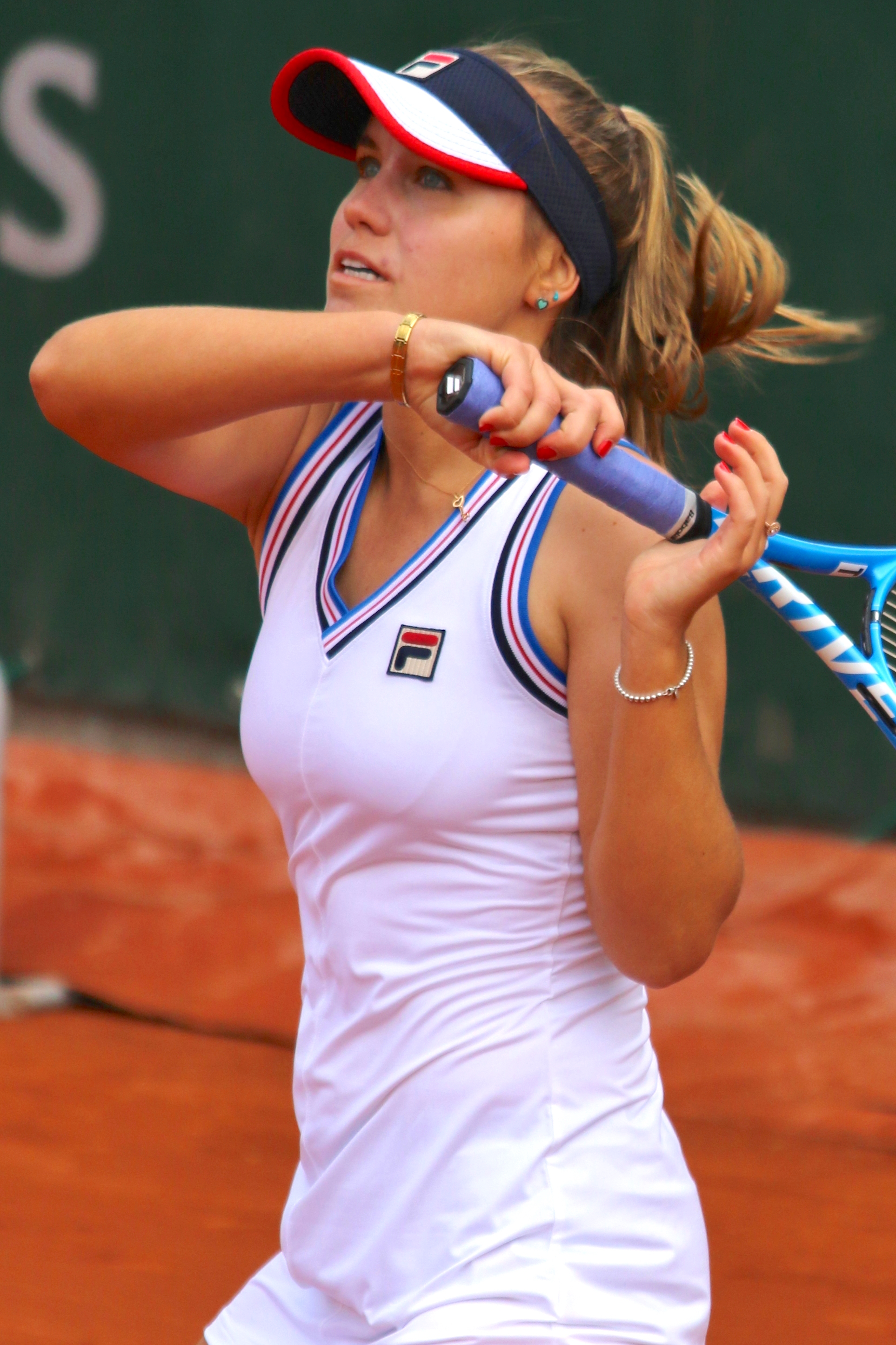 Kenin RG19 (7)